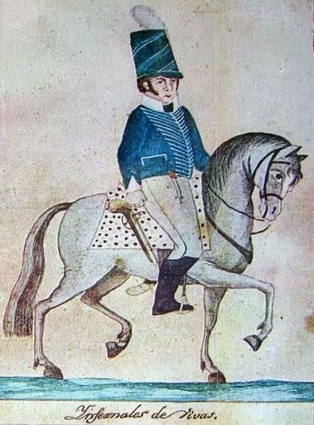 Soldado del escuadrón de Husares de Vivas